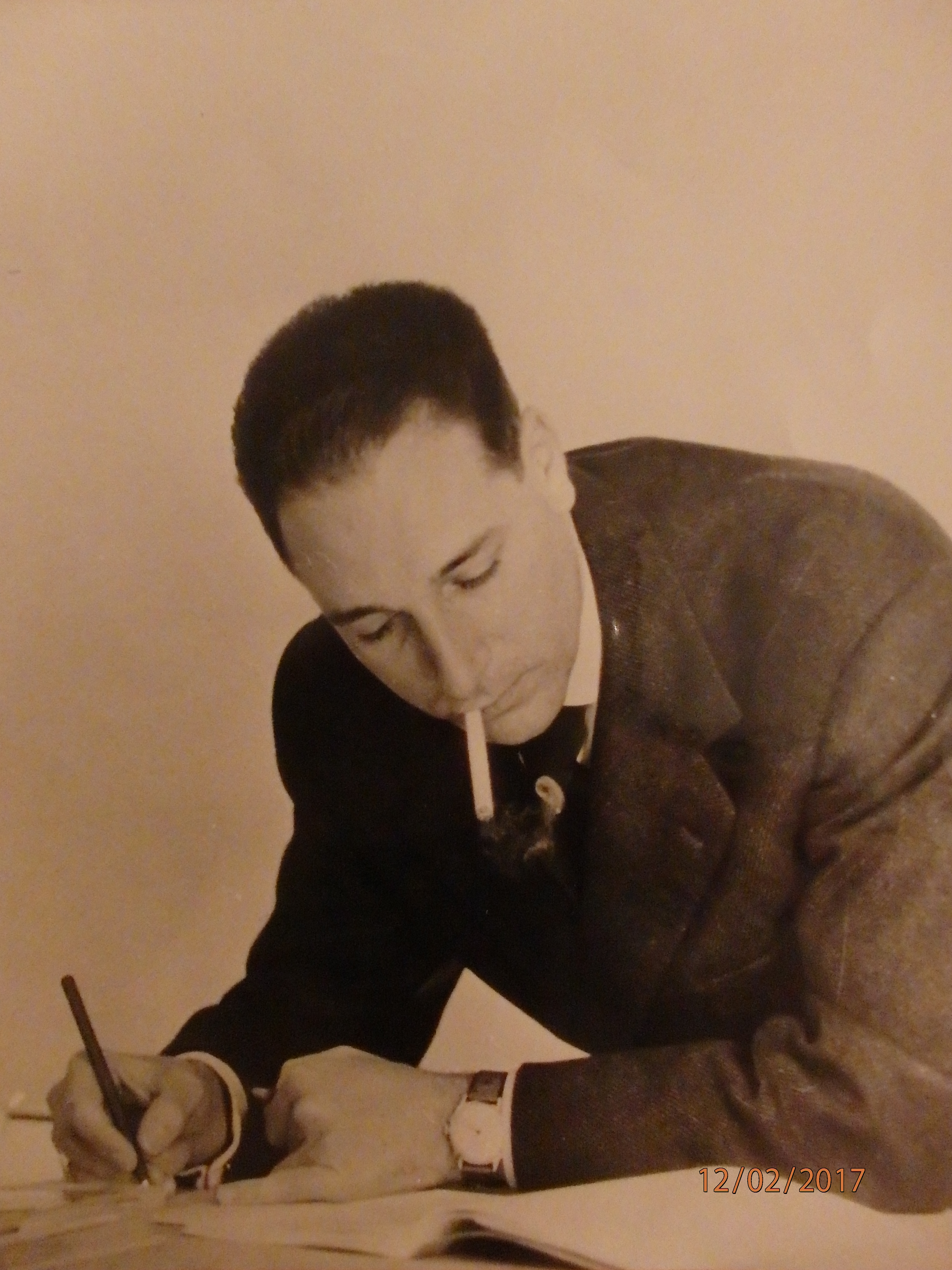 Lucien Malson, philosophe, écrivain et critique de jazz